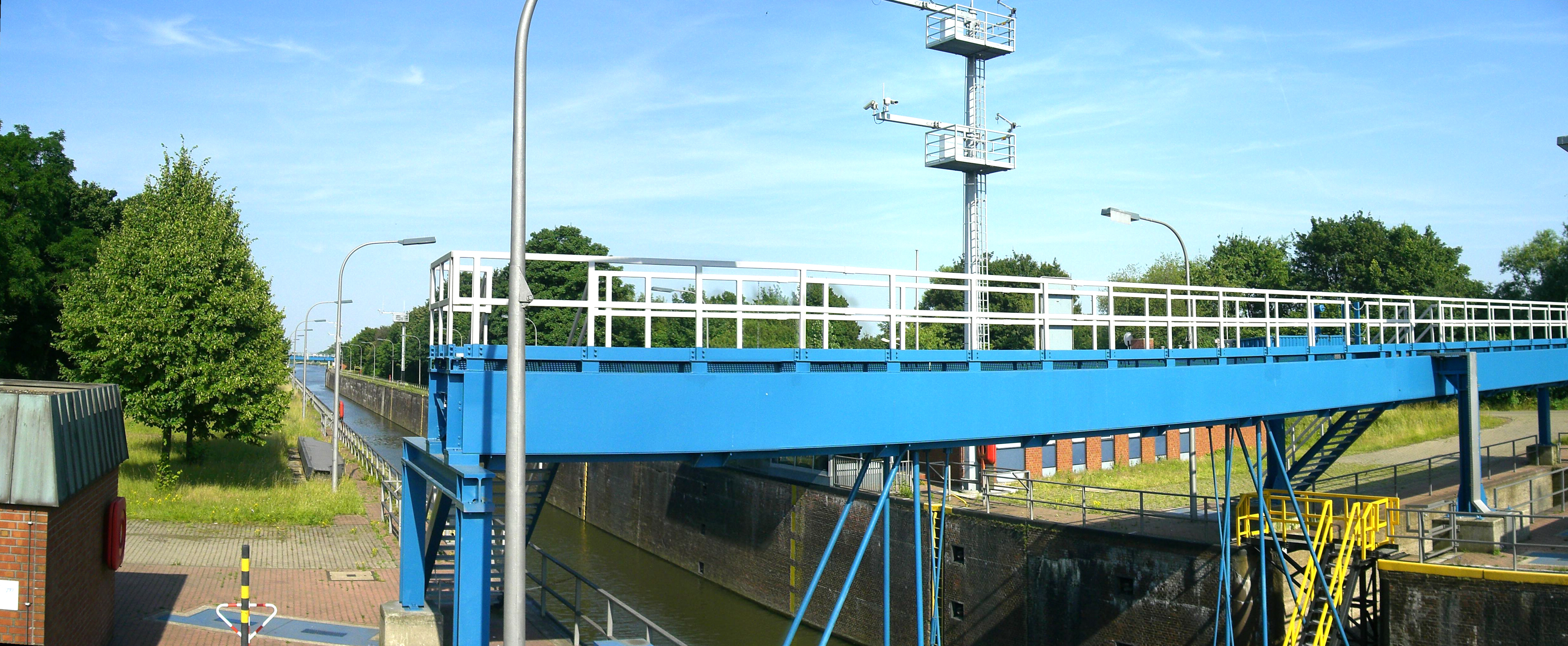 Ruhrschleuse Duisburg